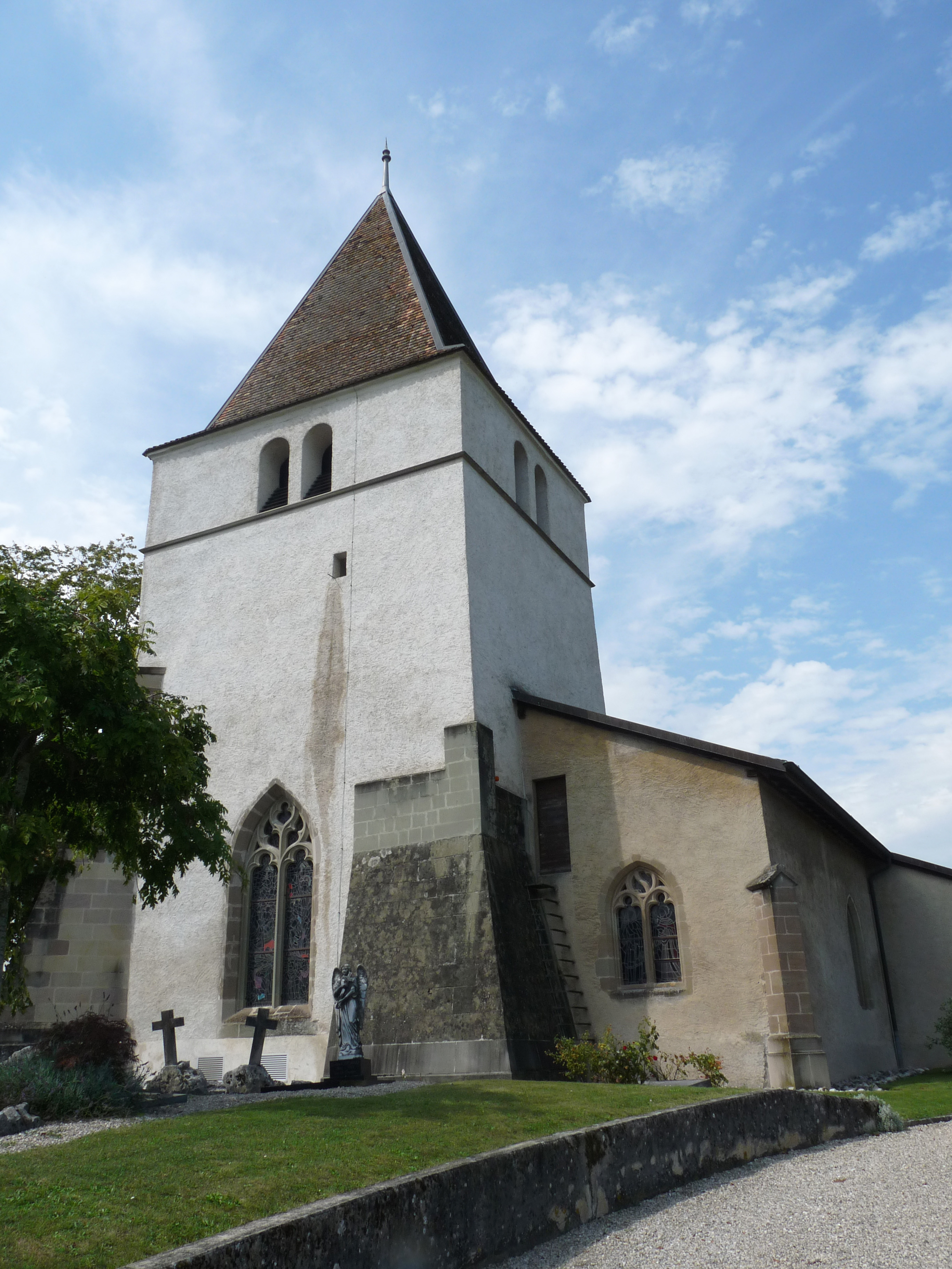 Eglise évangélique réformée Saint-Christophe de Commugny (canton de Vaud, Suisse)